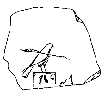 Gefäßgravur des König "Vogel"